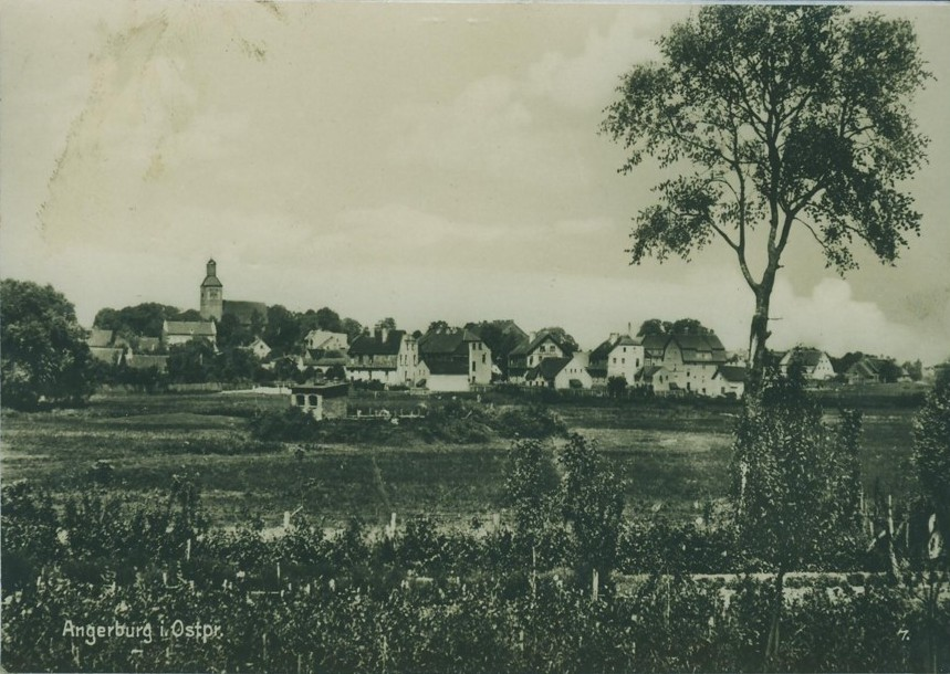 Panorama Węgorzewa na starej pocztówceAngerburg in Ostpreussen